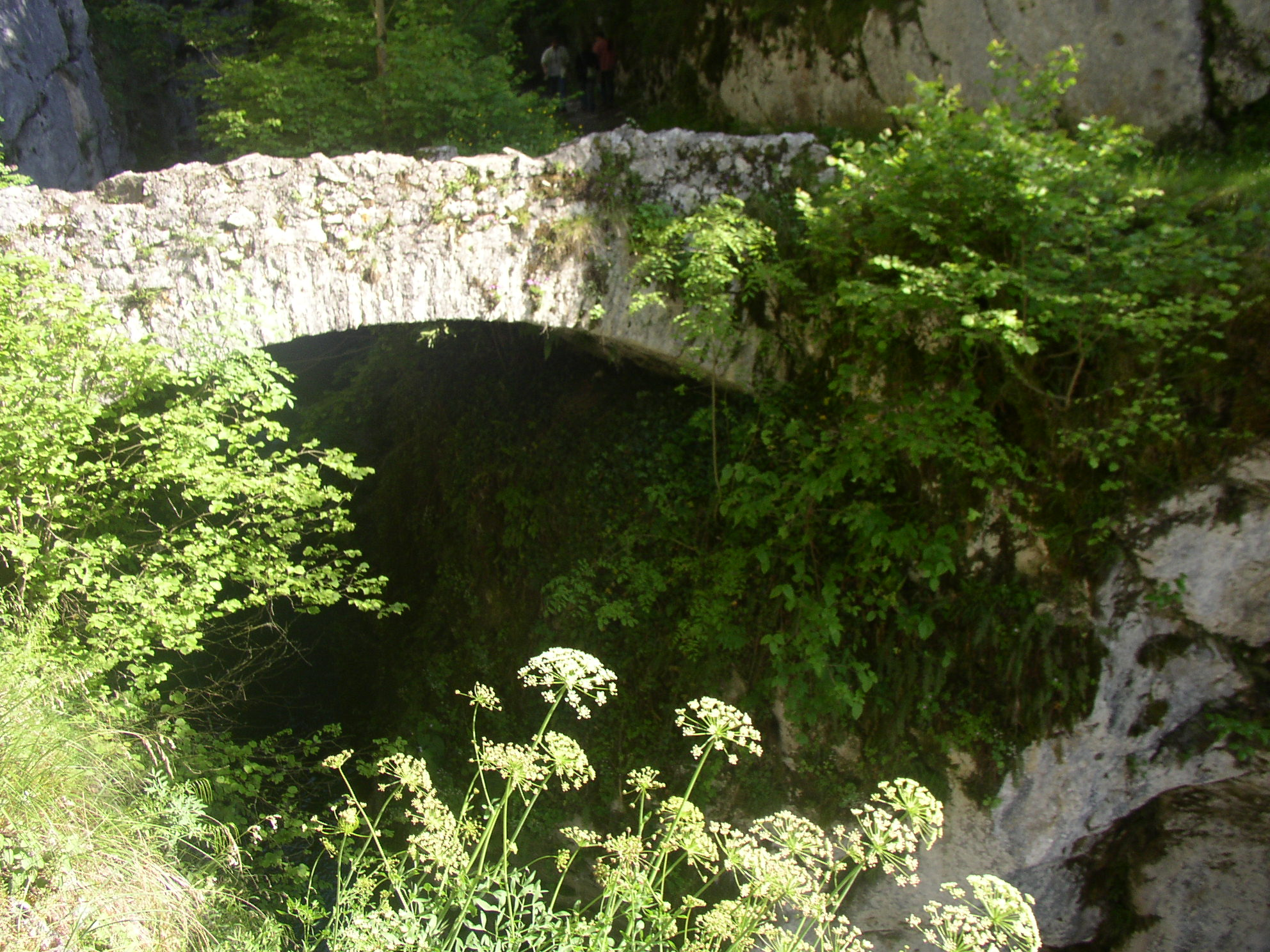 Pont Romain permettant la traversée du Guiers, dans l'avant-pays savoyard, le 25/05/06. Photo personnelle.